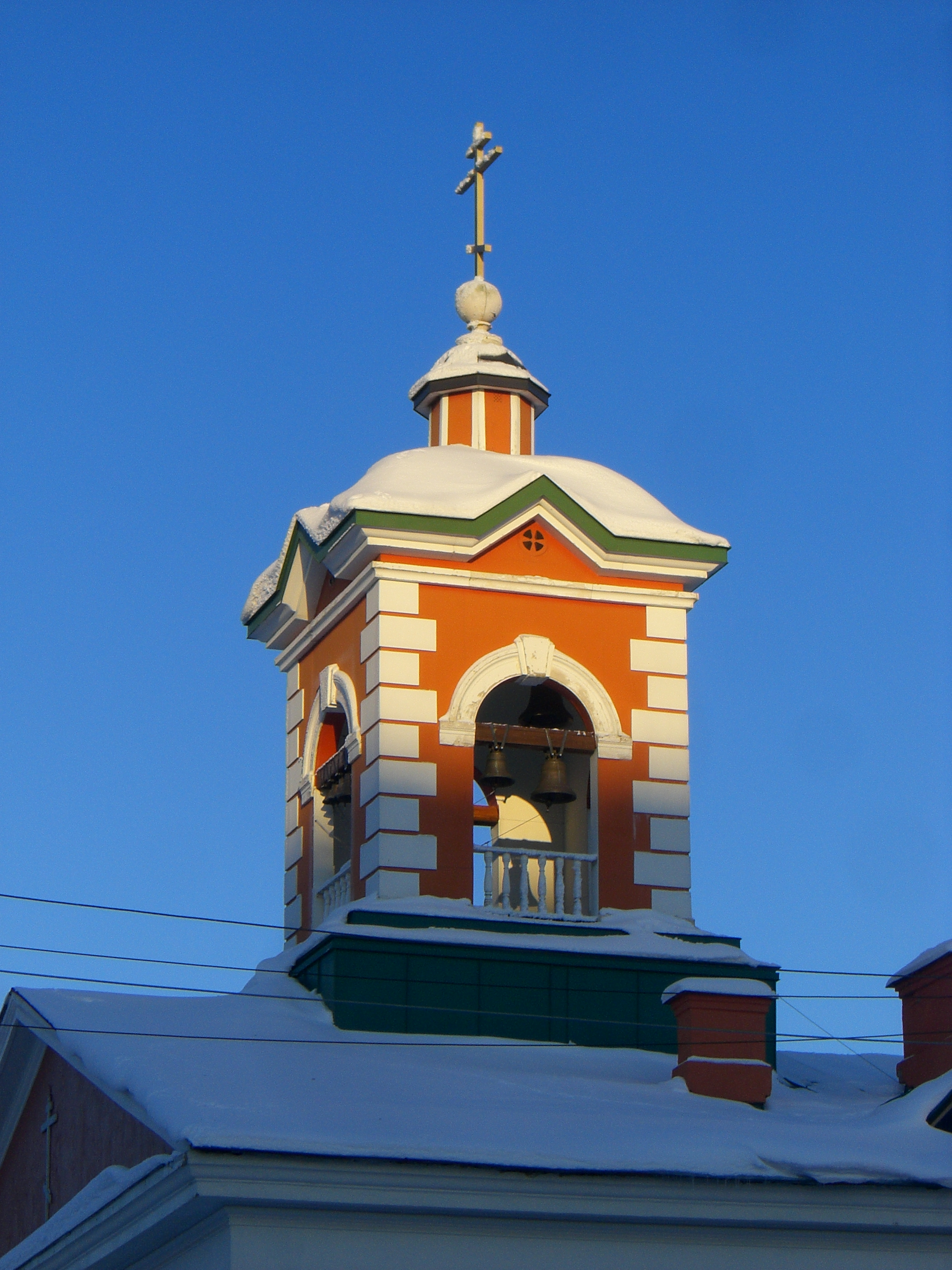 Колокольня церкви святого Иоанна Милостивого в городе Отрадное Ленинградской области